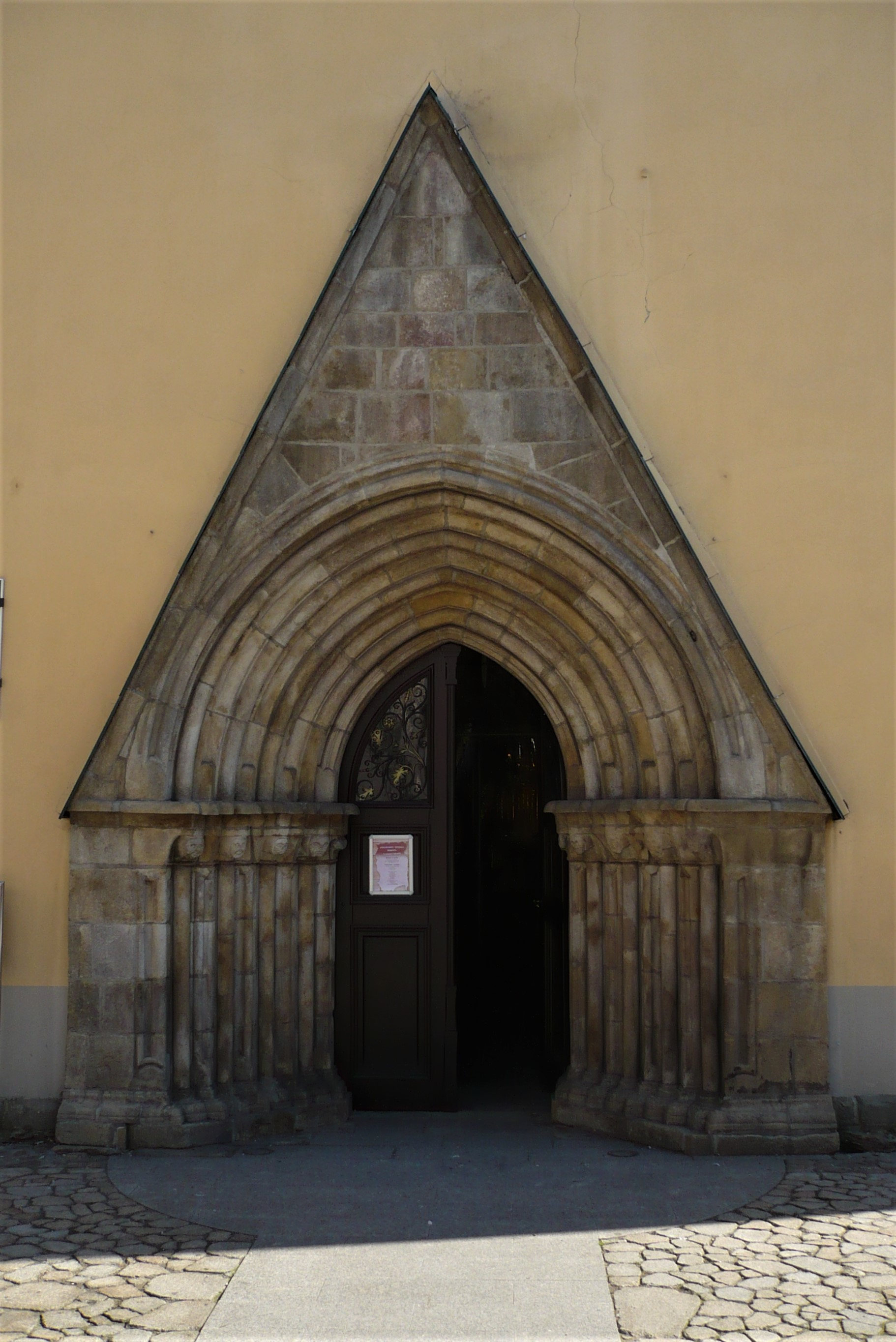 Głuchołazy. Kościół św. Wawrzyńca